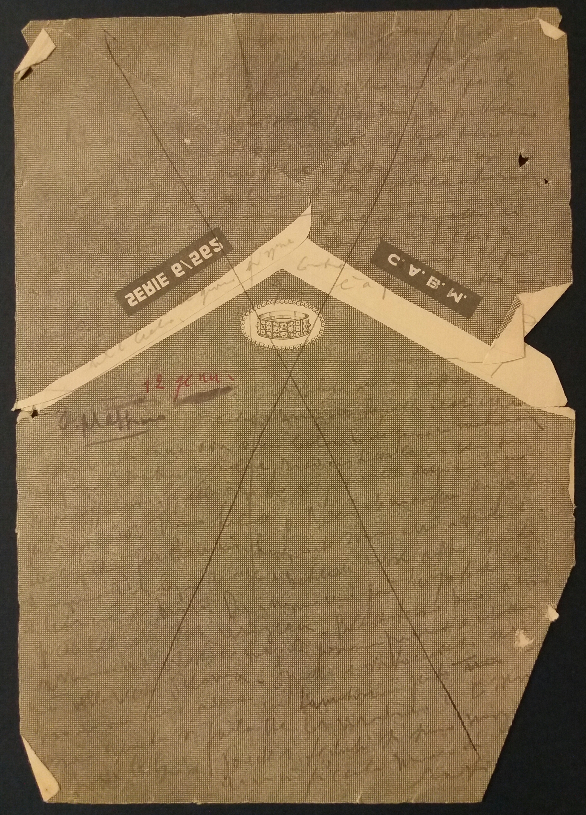 Giulio Prunai. Busta usata per scrivere il proprio diario